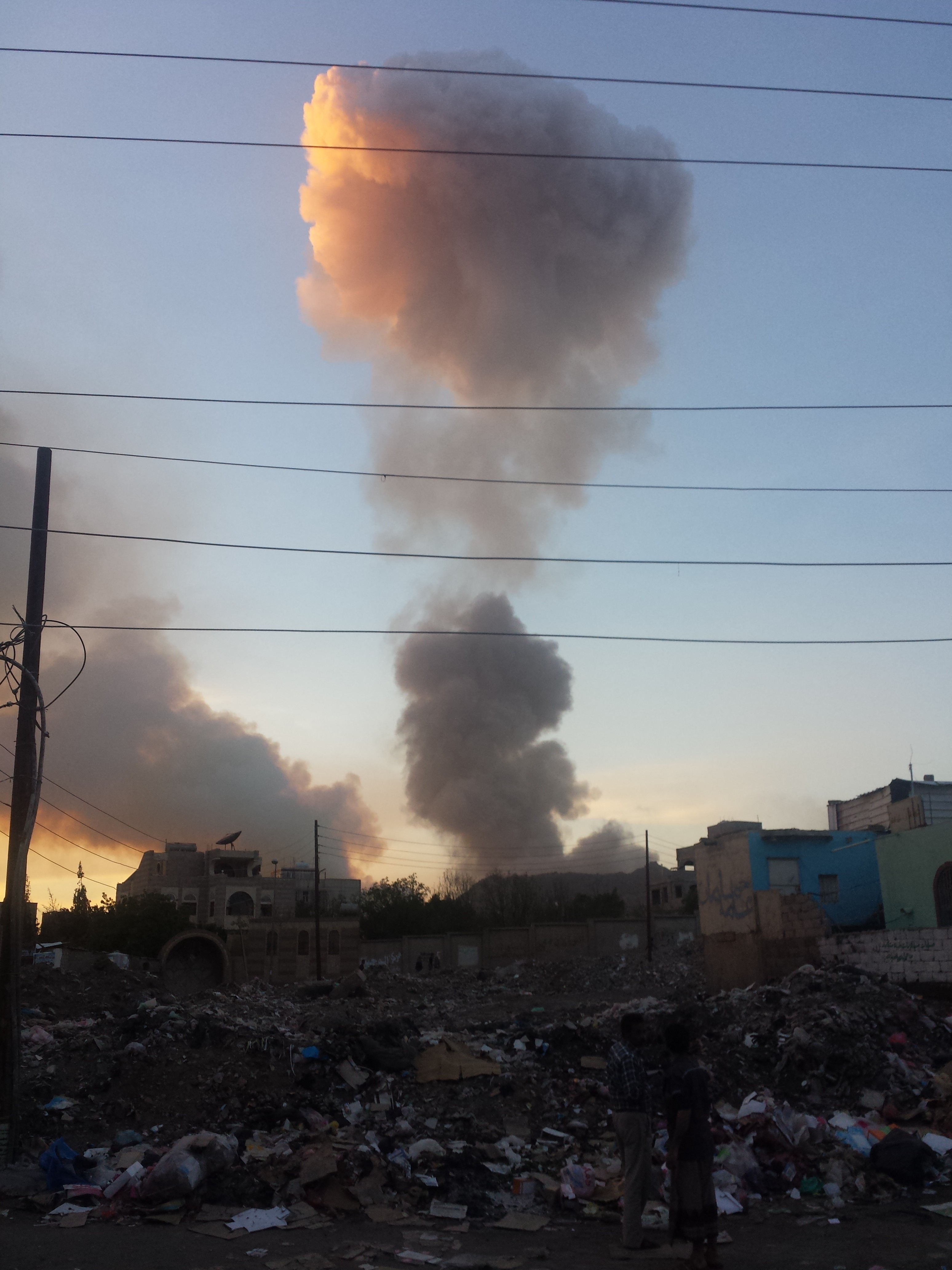 غارة جوية على مخازن الصواريخ والأسلحة في جبل نقم شرق صنعاء 11 مايو 2015.